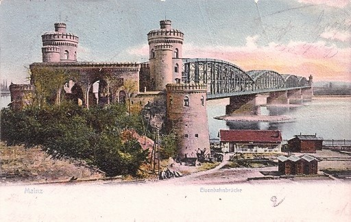 Ansichtskarte der Mainzer Südbrücke vom Beginn des 20. Jahrhunderts.